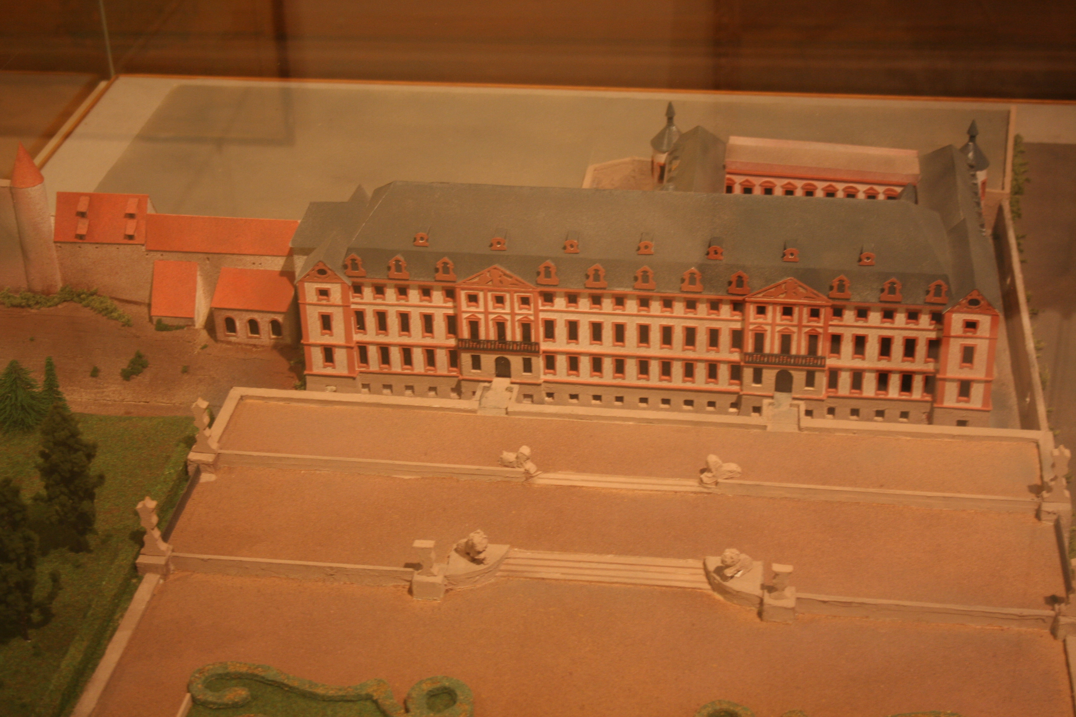 Maquette du château de Saverne avant l'incendie de 1779